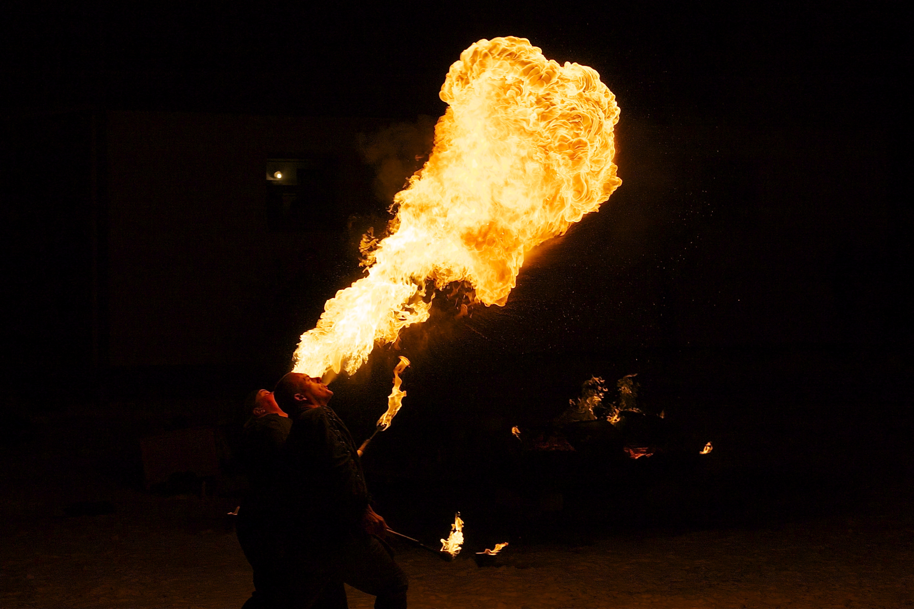 Feuerspucker bei der Paffenfanger Raunacht 2010